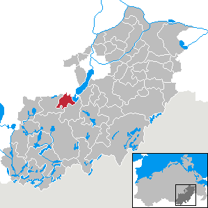 Hohenzieritz in Mecklenburg-Vorpommern, Landkreis Mecklenburg-Strelitz